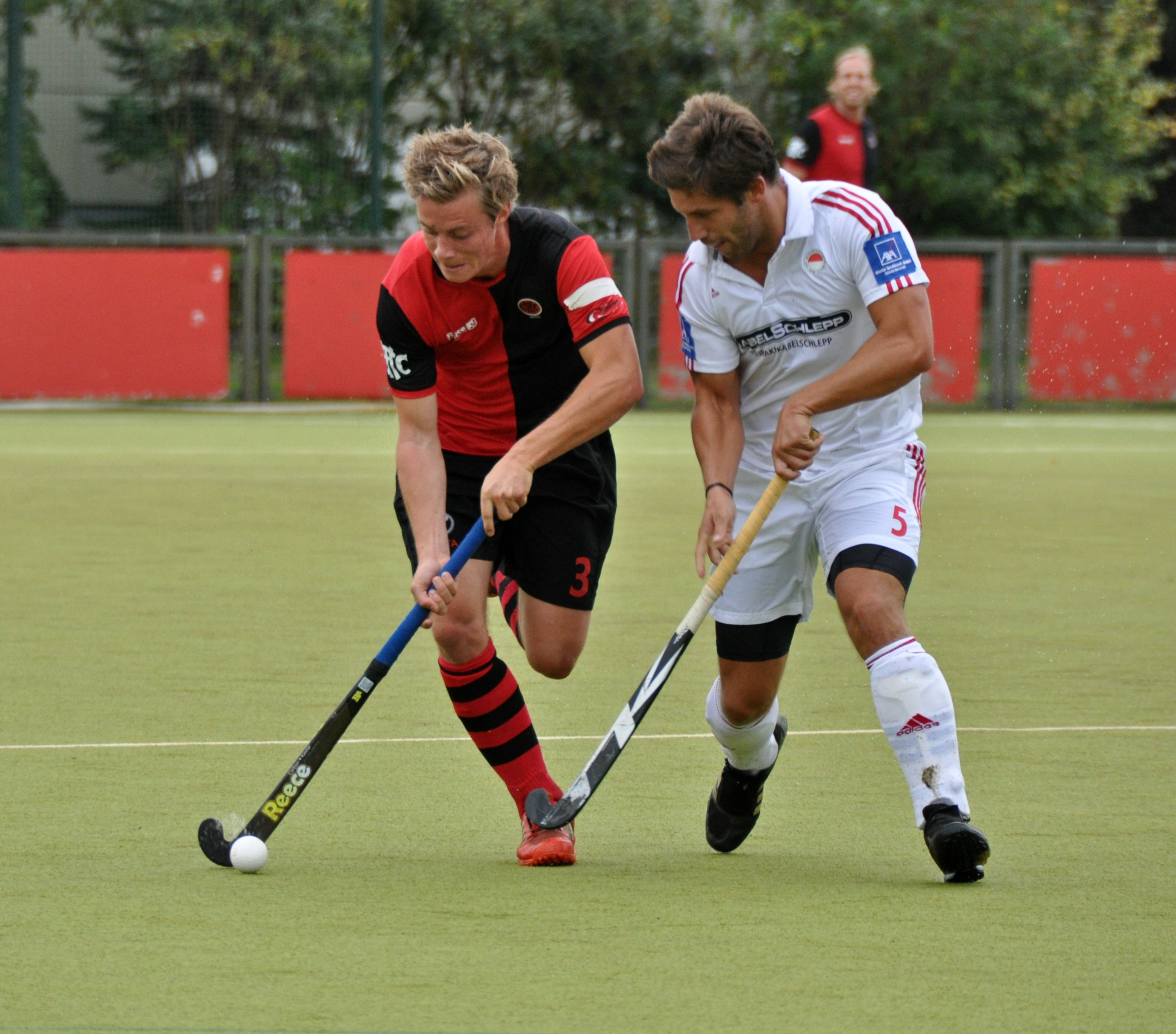 Feldhockey Herren, 1. Bundesliga, Mats Grambusch, Stefan Menke, GHTC - KHTC Rot-Weiss am 23.09.2012